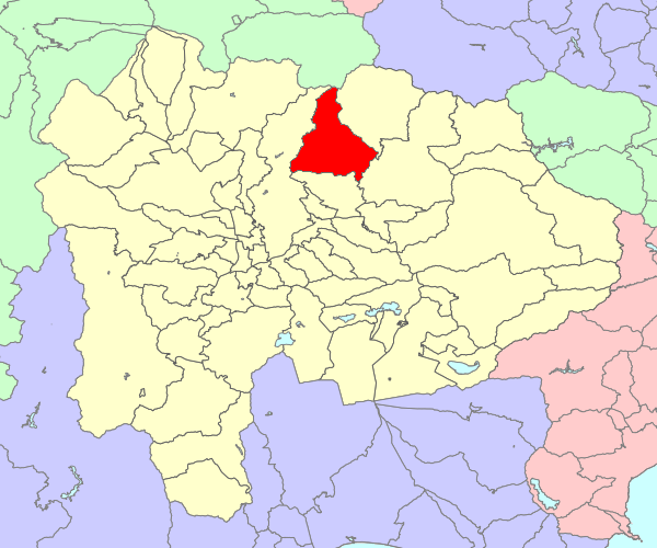 山梨県東山梨郡牧丘町の位置画像。